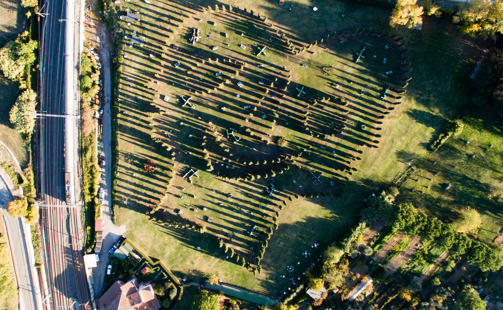 500px provided description: Trees Face [#park ,#trees ,#river ,#sun ,#italy ,#tree ,#bridge ,#aerial ,#art ,#face ,#italia ,#faces ,#florence ,#aerials ,#firenze ,#toscana ,#tuscany ,#sole ,#gree ,#phantom ,#ponte ,#arno ,#parco ,#arte ,#fiume ,#aerea ,#dji ,#aeree ,#phantom3 ,#pazzagli]